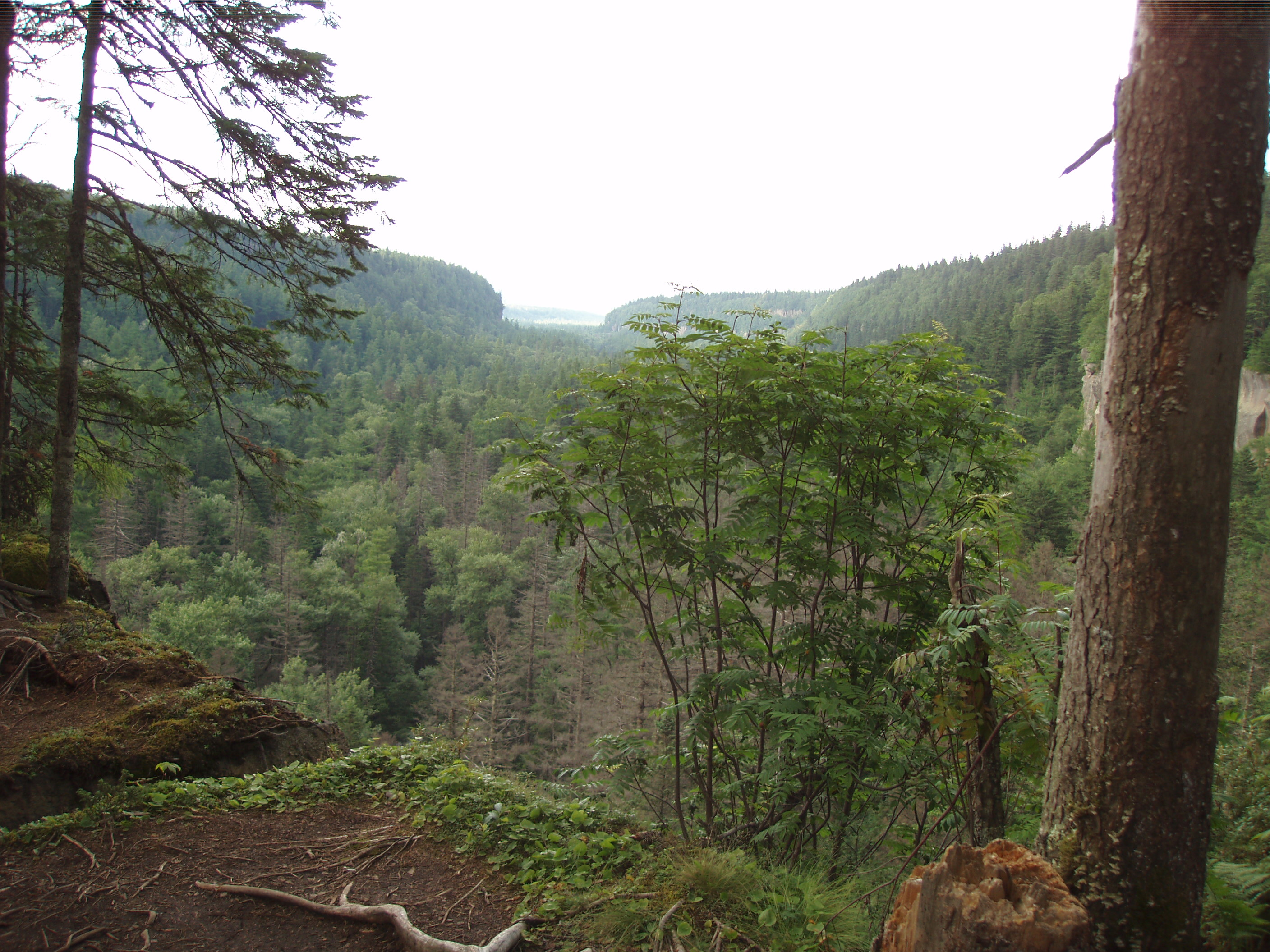 長白山森林。